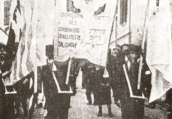 Манифестация на еврейски работници в Солун